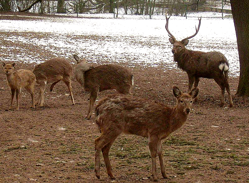 Dybowskihirsche (Cervus nippon hortulorum) im Tiergarten Nürnberg.